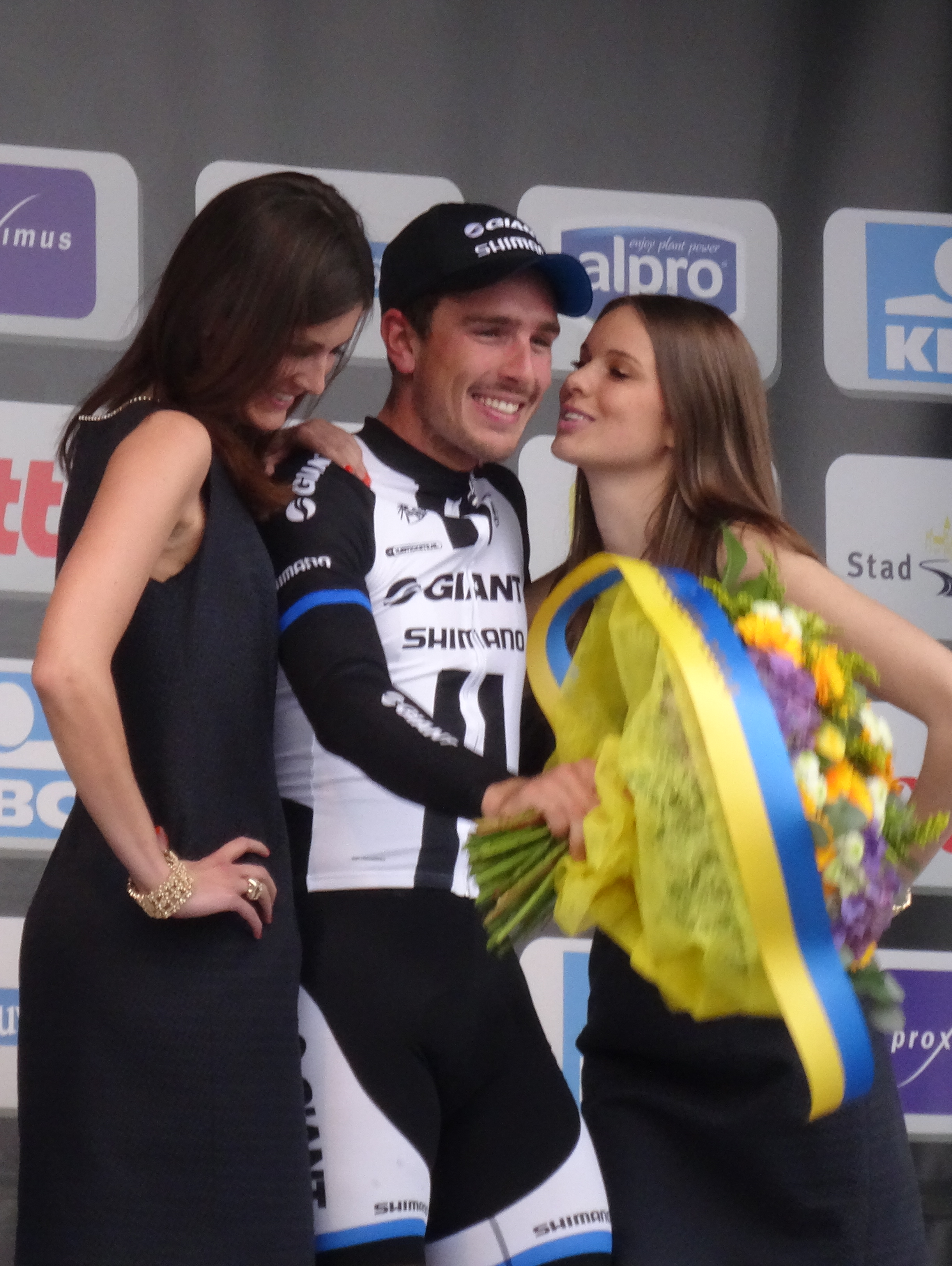 Reportage photographique réalisé le dimanche 30 mars à l'occasion de l'arrivée de Gand-Wevelgem 2014 à Wevelgem, Belgique.